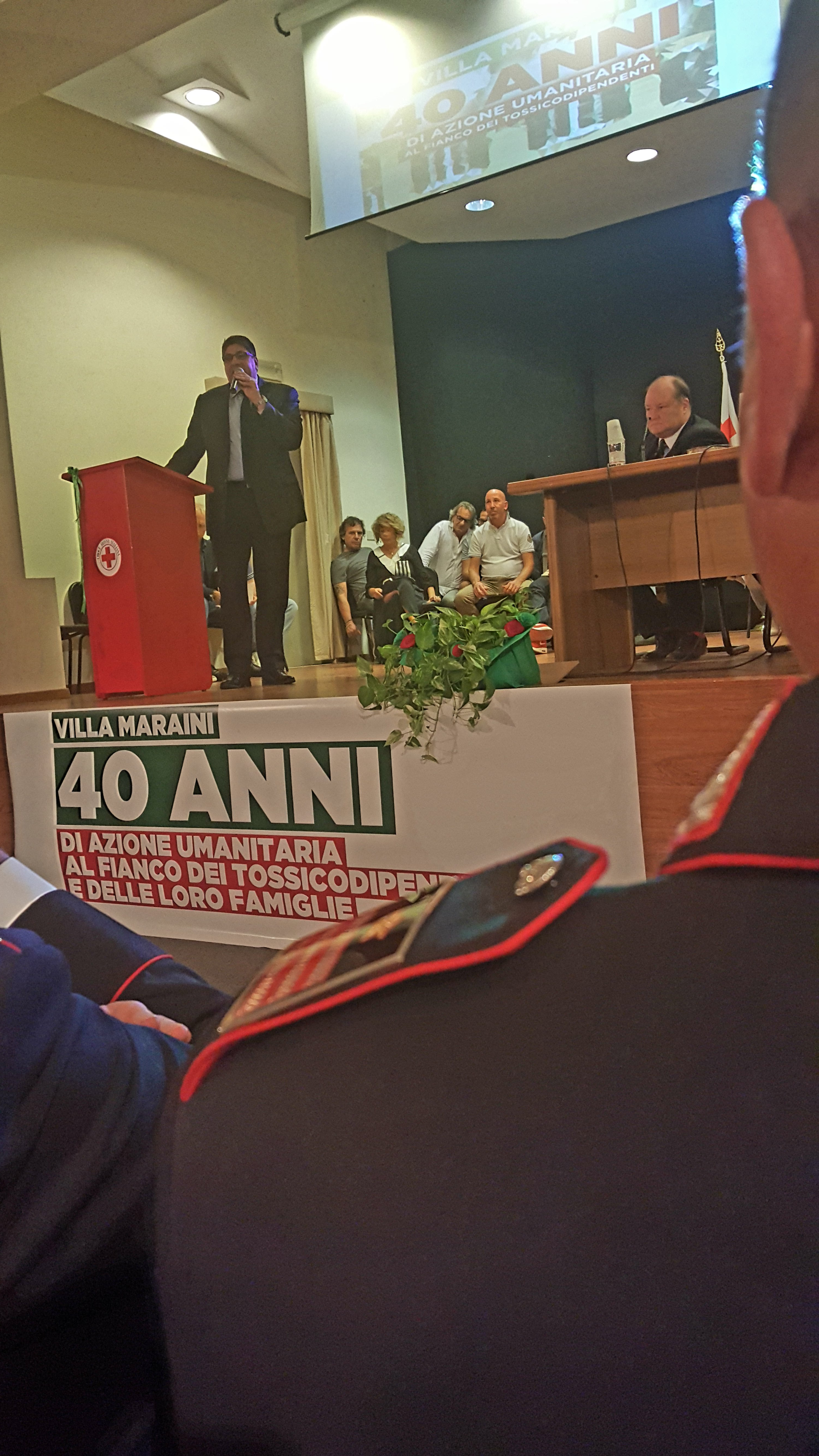 Massimo Barra, seduto, al 40' anniversario di Villa Maraini, a Roma, 2016